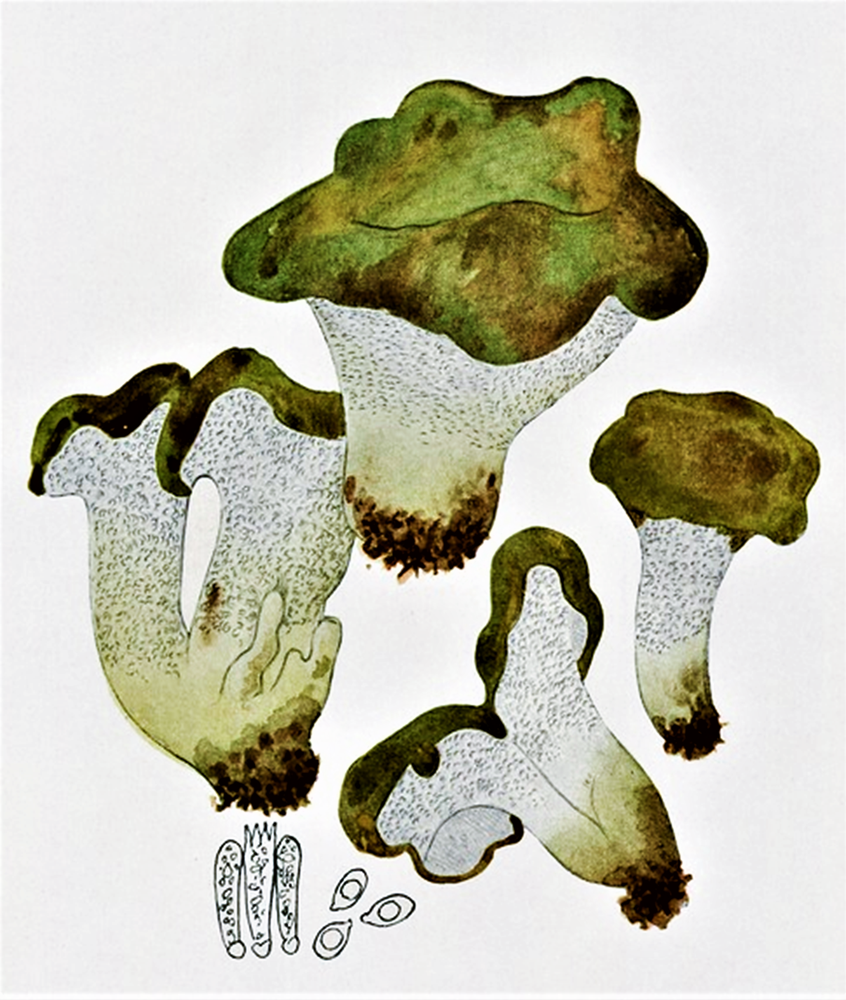 Giacomo Bresadola: Polyporus cristatus (Schaeff., 1774) Fr. (1821), heute Albatrellus cristatus (Schaeff.) Kotl. & Pouzar (1957)